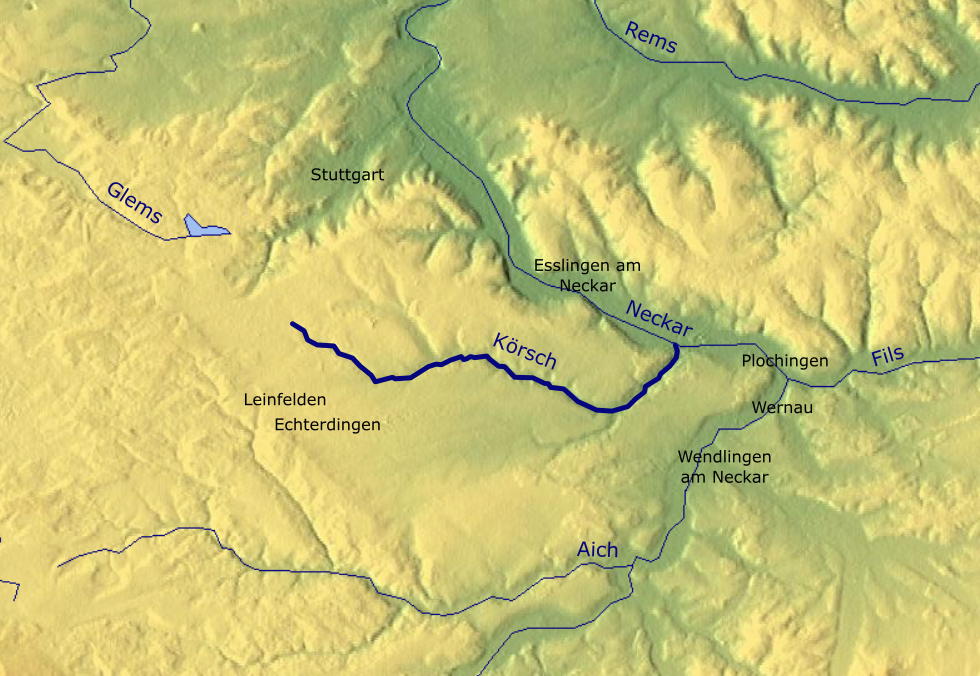 Relief-Karte im Raum Stuttgart, Körsch zentriert.